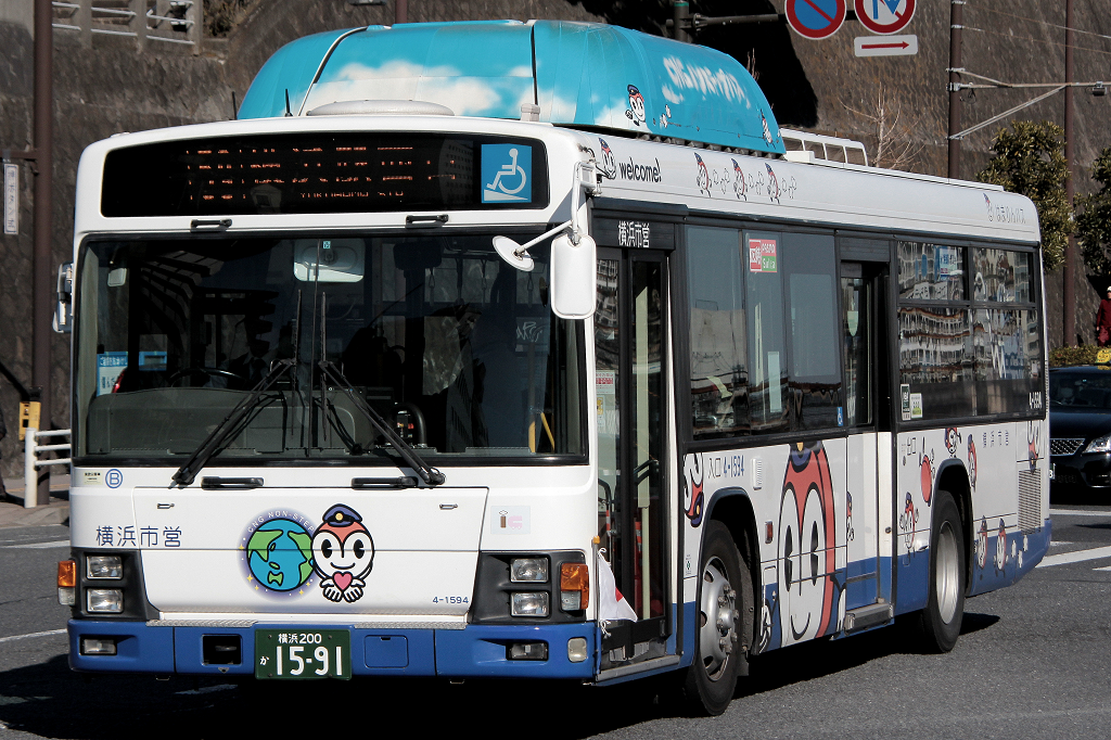 いすゞ エルガ CNG車 横浜市営バス4-1594号車